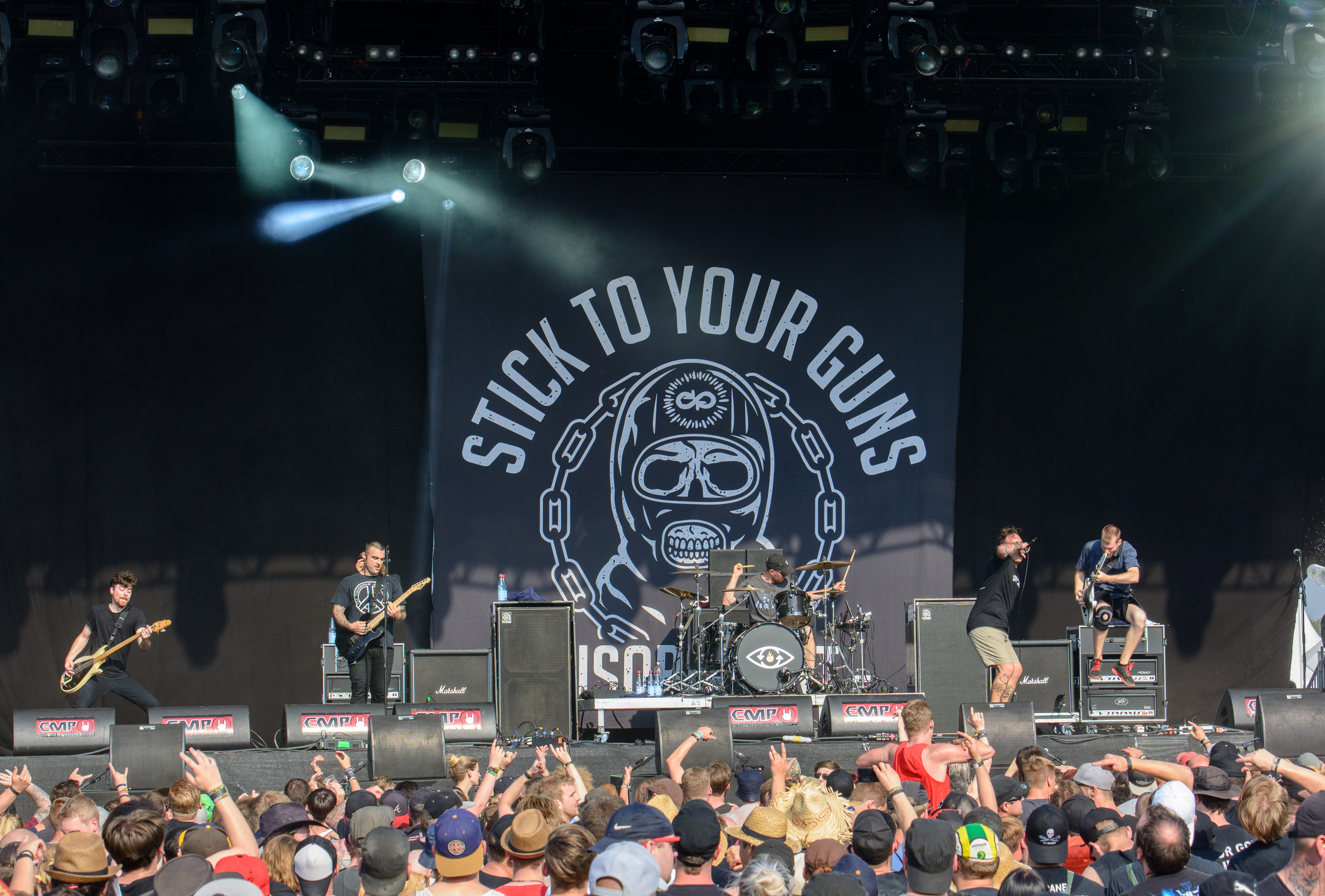 Stick To Your Guns beim Reload Festival 2016 in Sulingen